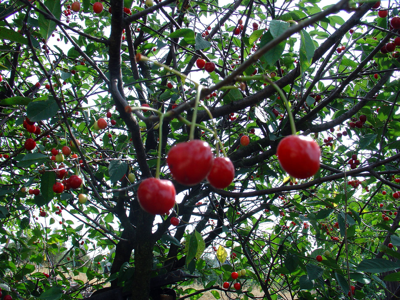 Kirschbaum mit reifen Früchten